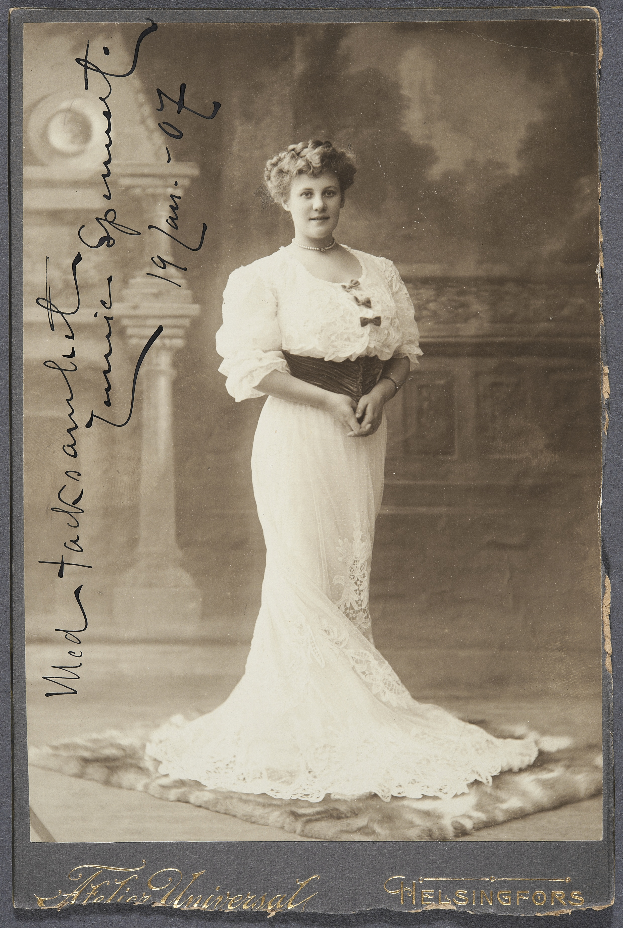 oopperalaulajatar Jenny Spennert; oopperalaulaja Jenny Spennert. Hän lopetti kansainvälisen uransa 1910-luvulla, mutta palasi näyttämöille 30 vuotta myöhemmin. pysty, mustavalkoinen